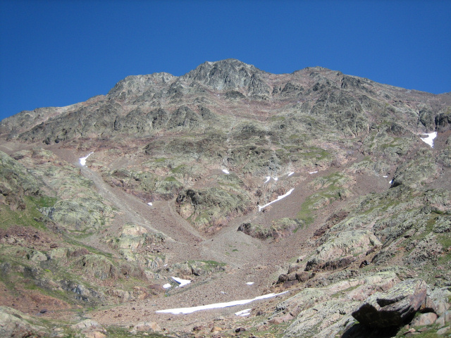 Pica d'Estats des de la cara Sud-Oest, fotografiada el 31 d'agost de 2005 per en Jesús Agudo, en l'excursió que en Paco, la Marta, la Carmen, l'Elena i en Jesús van fer al "cim de Catalunya". Visca l'Estiu Diferent!